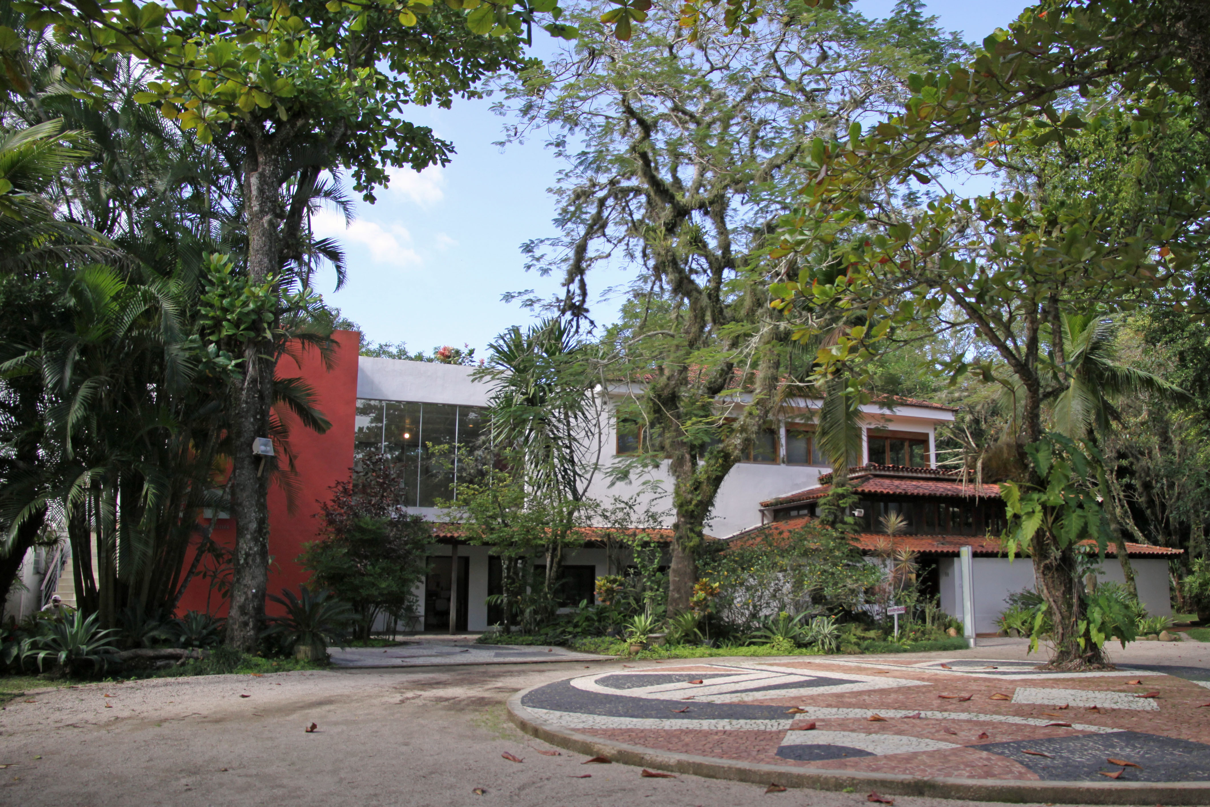 O Museu Casa do Pontal é o maior museu de arte popular do Brasil.